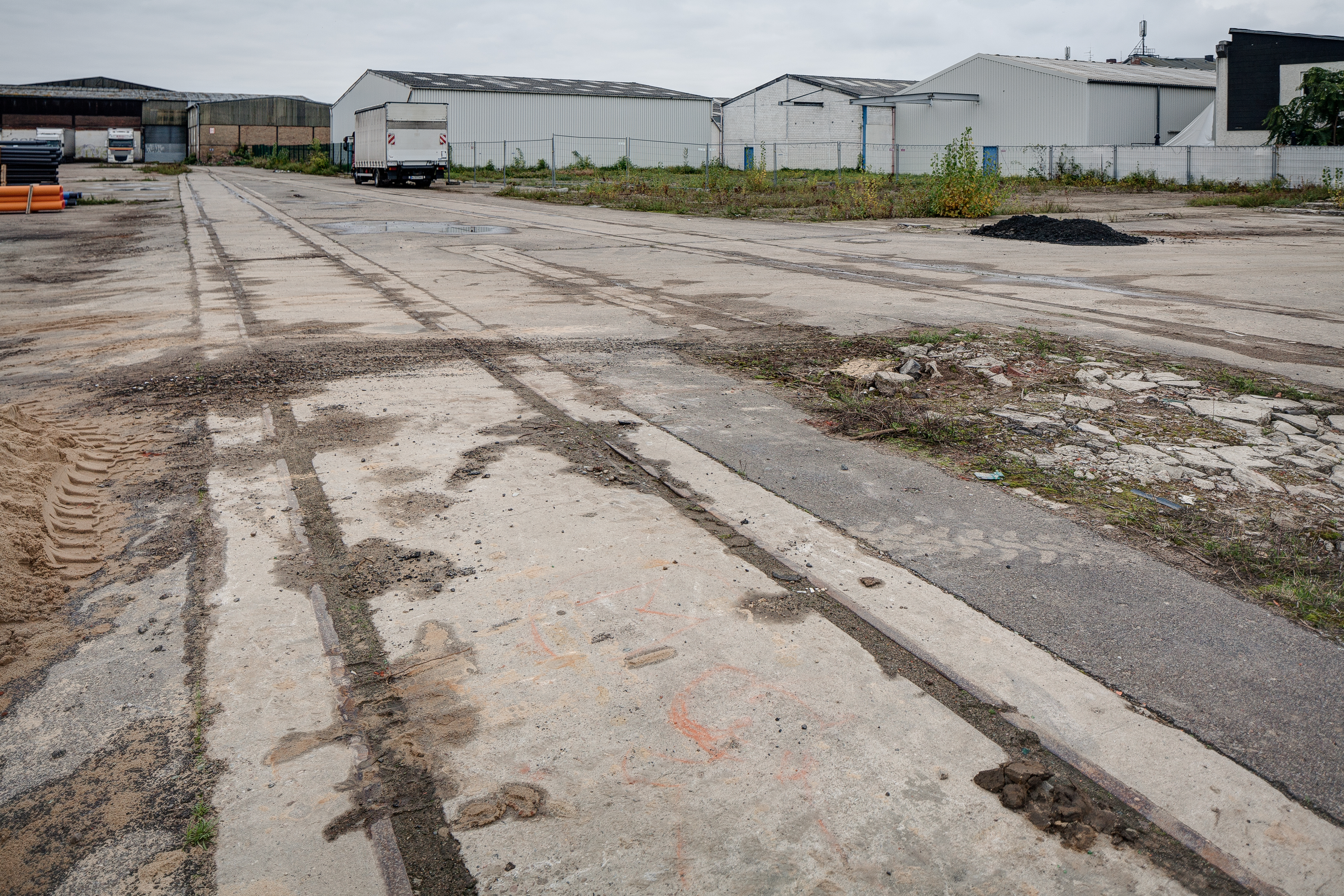 Gelände des früheren Localbahnhof Hannover, später Südbahnhof genannt. Zum Zeitpunkt der Aufnahme, 2013, liegen noch große Teile des Geländes brach; wenige Reste der Bahngleise sind noch zu erkennen.